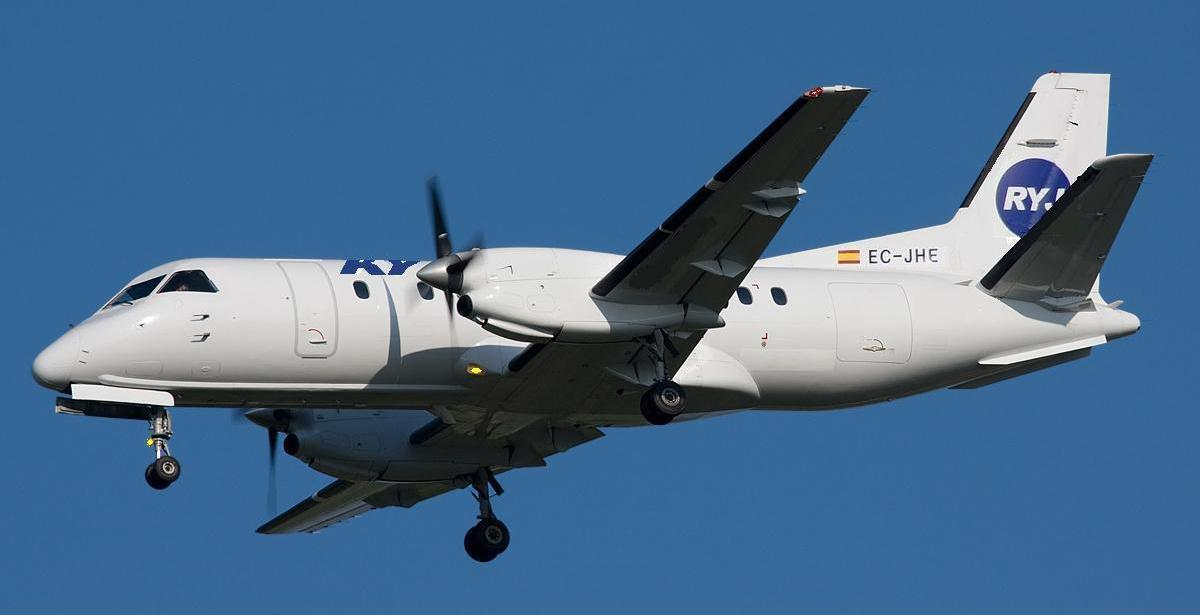 Aeronave SAAB 340 aterrizando